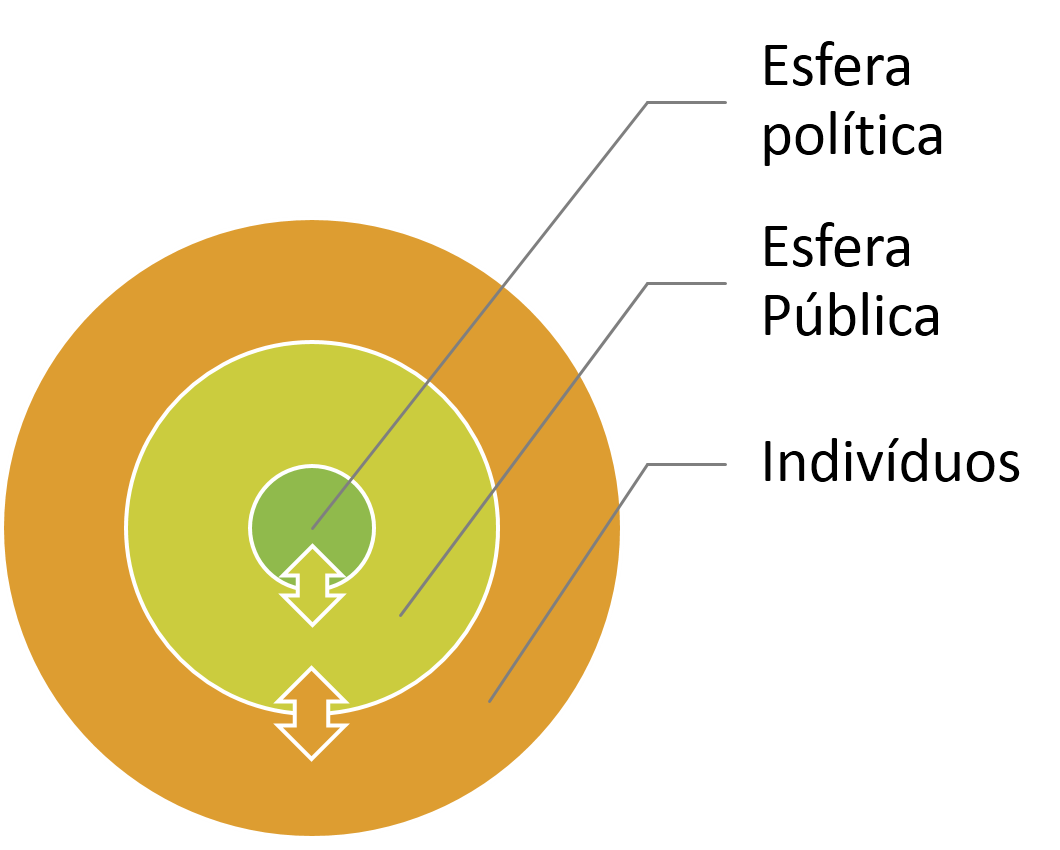 Segundo a definição de Habermas, a esfera pública age como mediadora entre a esfera política e a esfera dos indivíduos. Ela funciona como filtro e tanto exerce influência sobre estas como é por elas afetados.